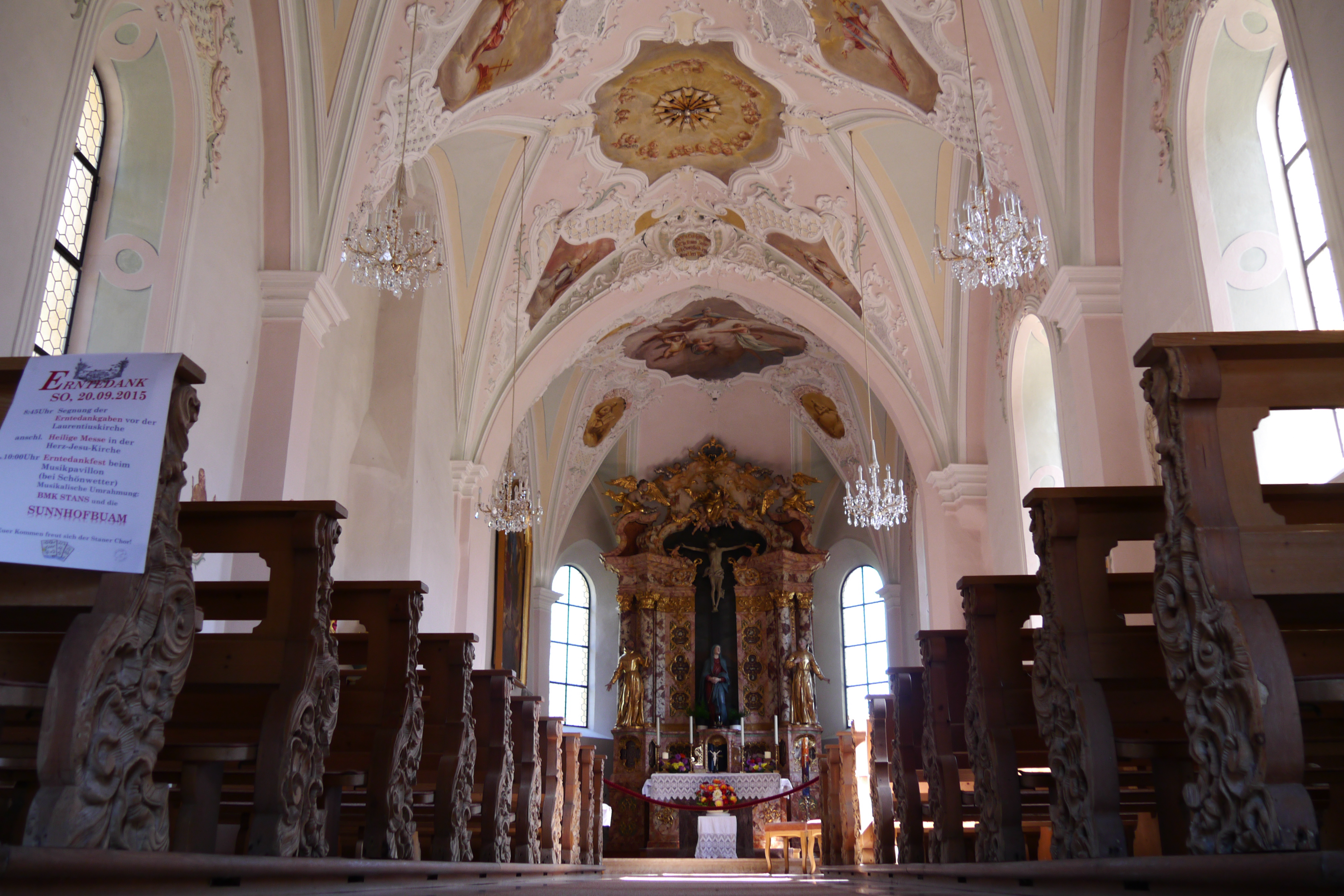 Kath. Pfarrkirche hll. Laurentius und Ulrich und Kirchhof, Stans (Tirol), Innenraum